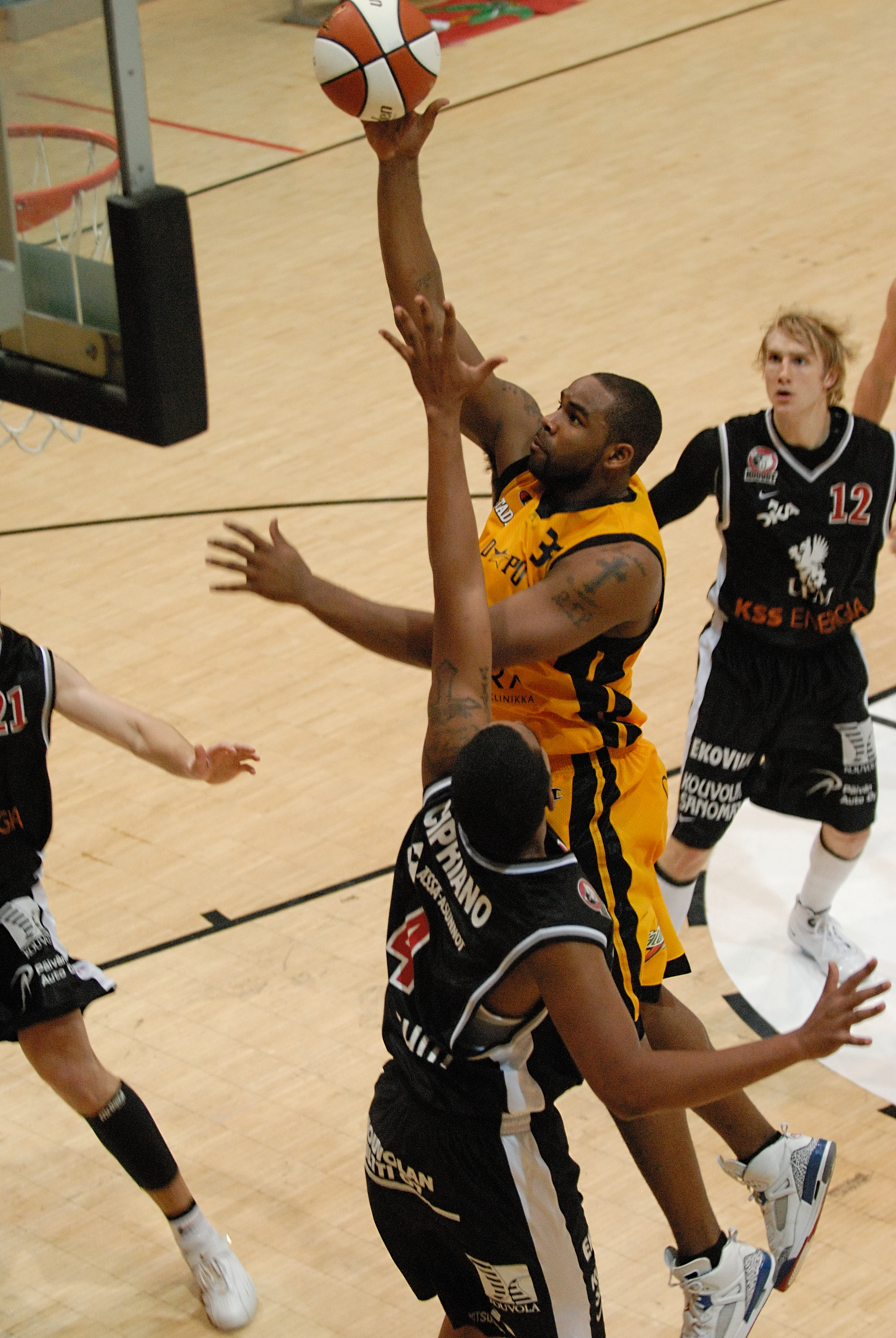 Jerald Fields playing for Torpan Pojat at Töölön Kisahalli, Helsinki, Finland against Kouvolan Kouvot.